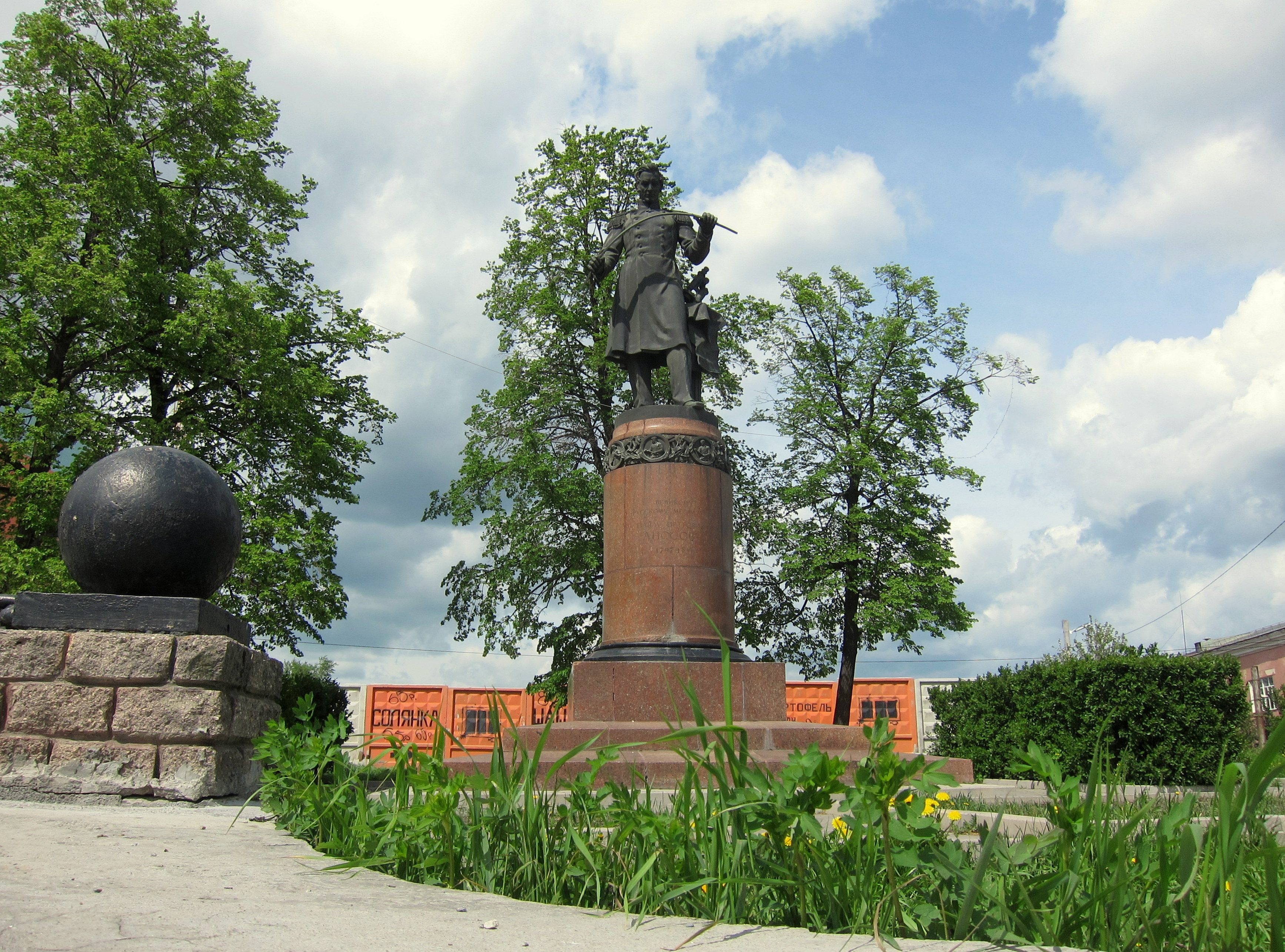 памятник металлургу Аносову П.П. (Челябинская область, Златоуст, площадь III Интернационала)